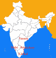 Lage des Unionsterritorium Pondicherry (Indien)